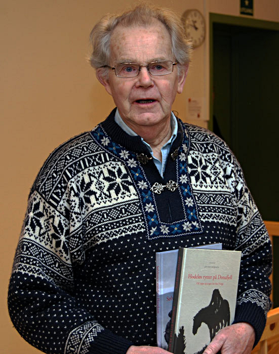 Lektor, forfatter og politiker for Venstre og Det Liberale Folkepartiet Øyvind Bjorvatn.